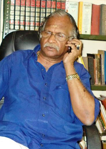 thampisir